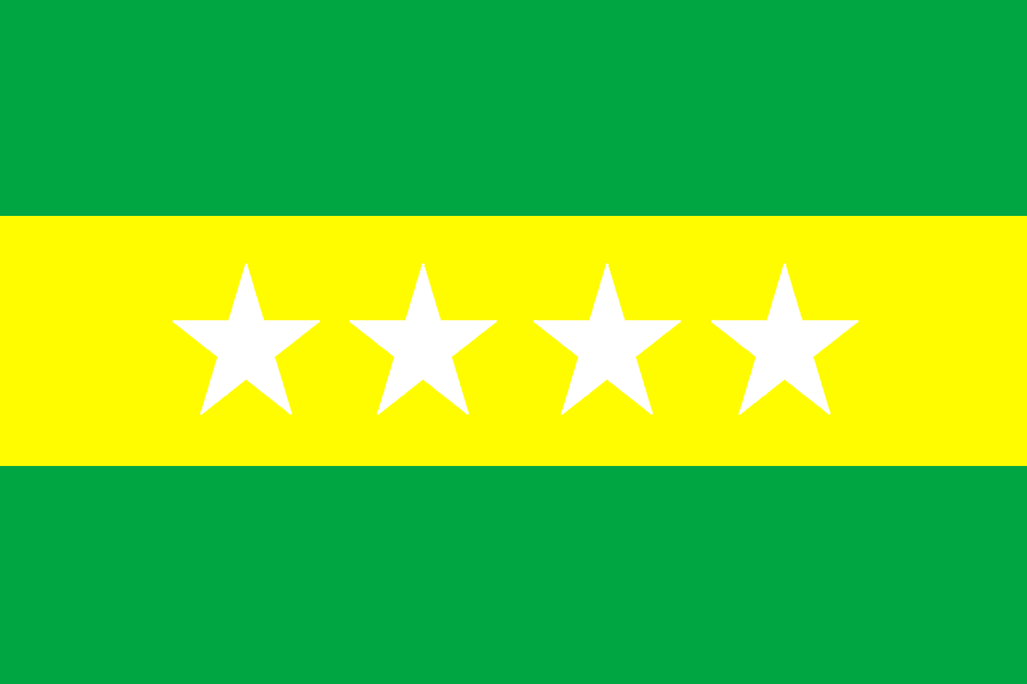 Simbolo Patrio del canton Salitre